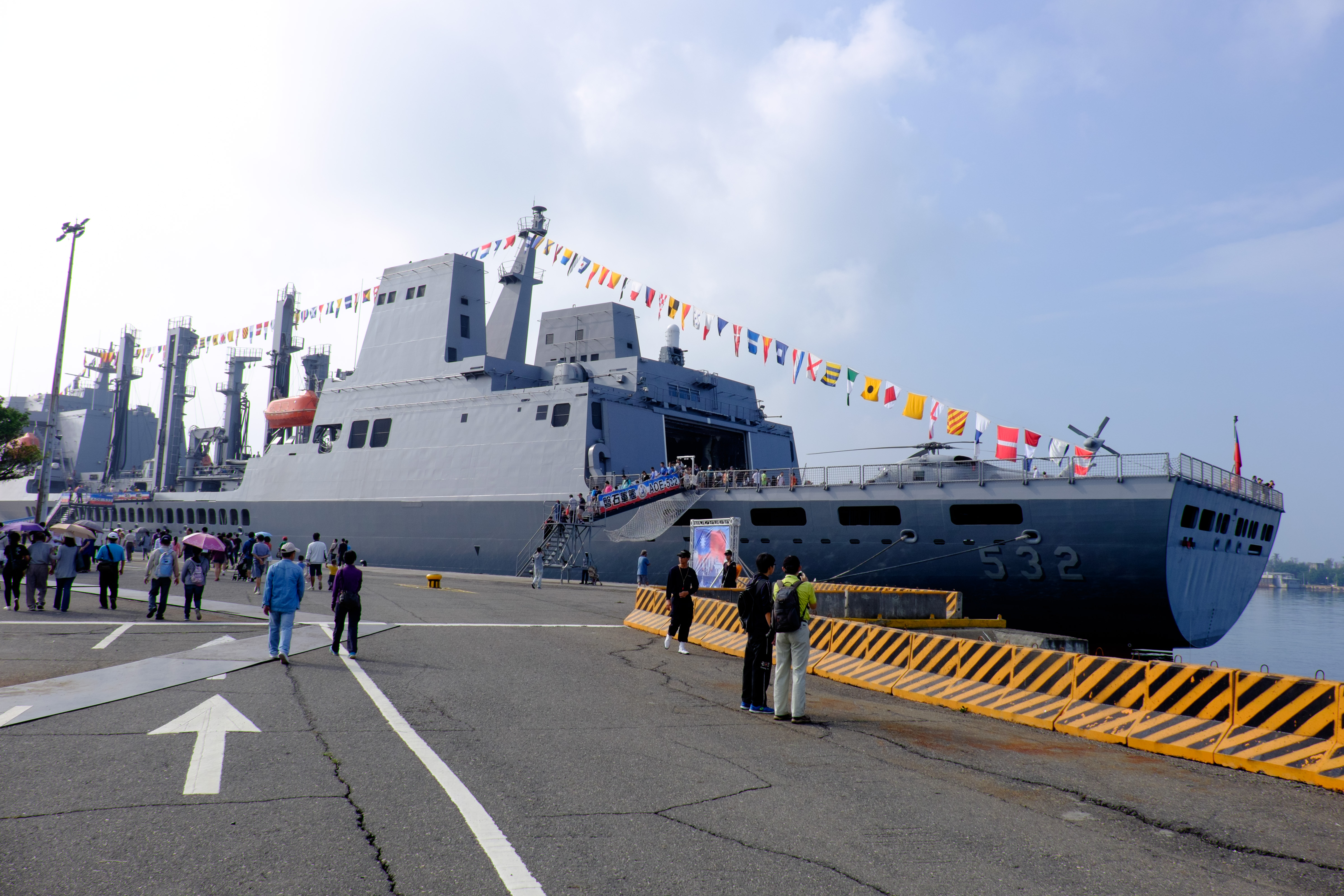 2015年左營軍港營區開放活動上午，東三號碼頭油彈補給艦磐石（AOE-532）左舷後部遠景。